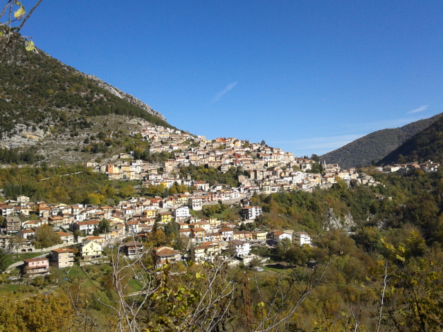 Parte antica del paese